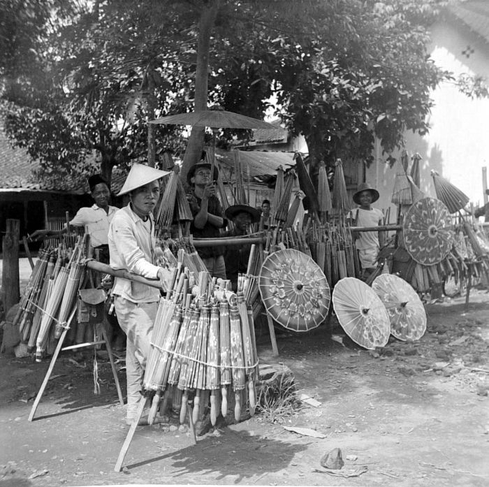 Negatief. Een voorbeeld van een zeer gespecialiseerde markt is de verkoop van parasollen (payung). Deze en vergelijkbare producten waren soms geïmporteerd. Vanaf de jaren dertig werden de Javaanse markten overstroomd met goedkope producten van de jonge Japanse industrie. Dit betekende weliswaar concurrentie voor de lokale en Europese nijverheid, maar drukte tevens de prijzen, zodat de onvermogende Javaanse consument goedkoper uit was. (P. Boomgaard, 2001). Verkoop van pajongs (parasols) langs een van de hoofdstraten van Madiun, Oost-Java